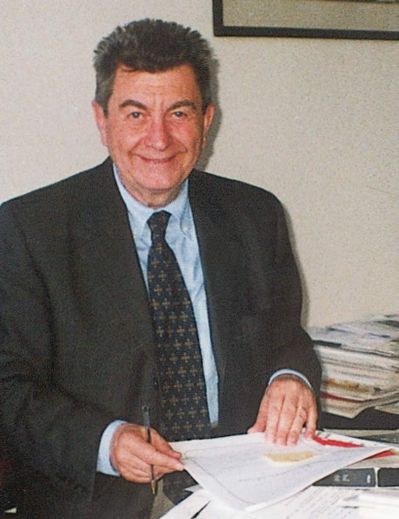 Franco Bassani